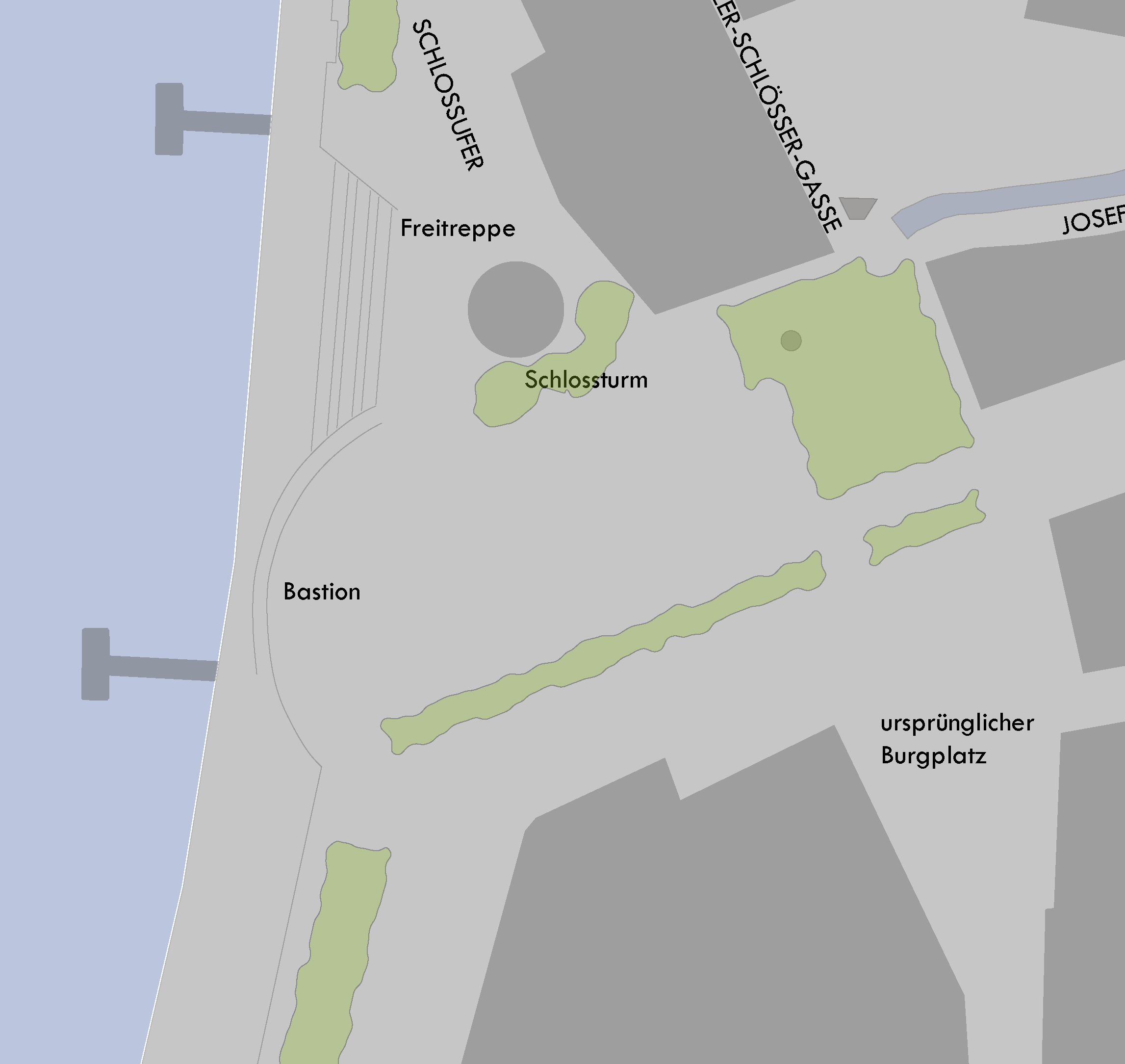 Map of Burgplatz, Duesseldorf / Lageplan Burgplatz, Düsseldorf